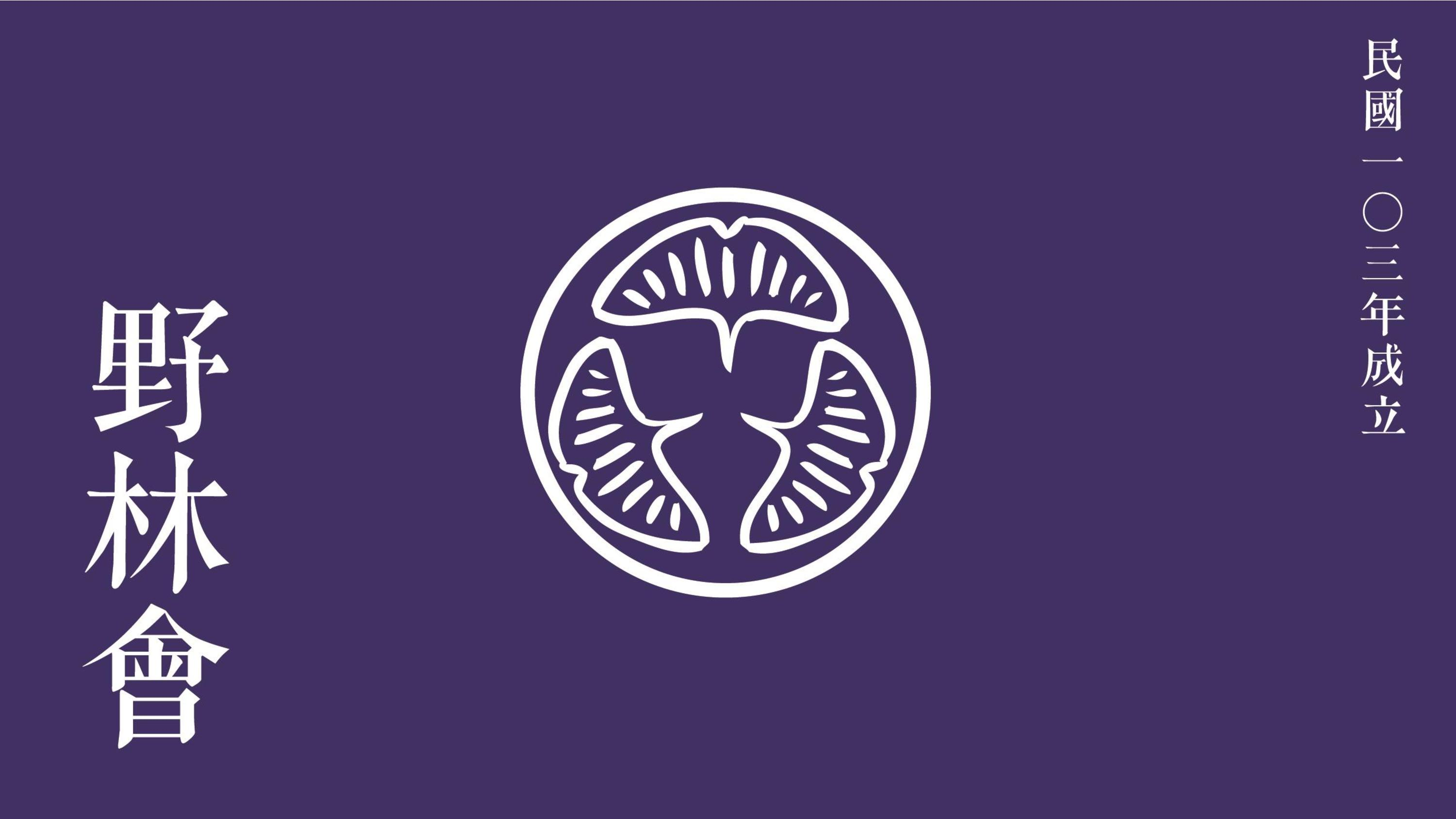 中文（台灣）: 野林康輔社，野林會，會旗。